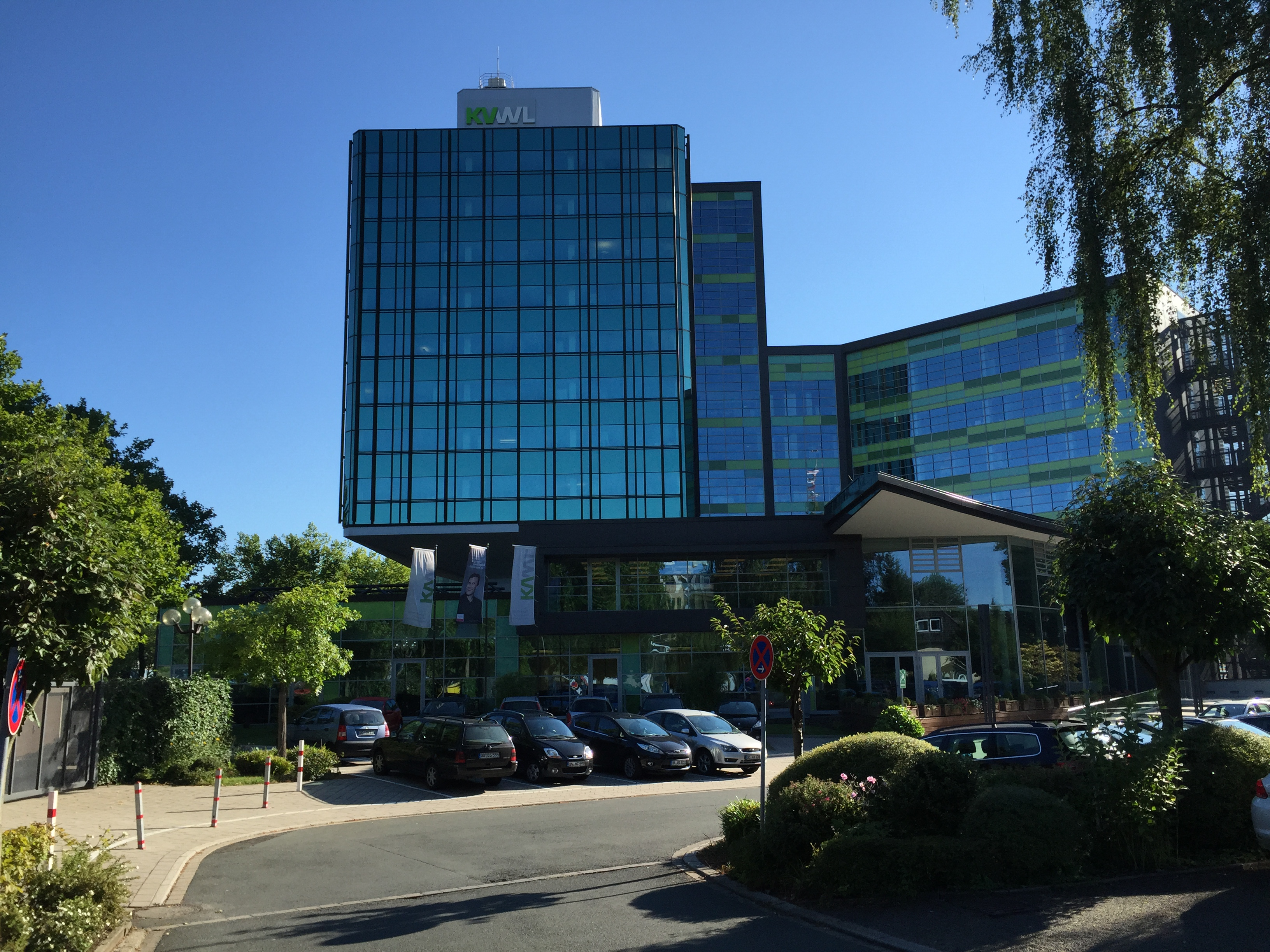 Kassenärztliche Vereinigung Westfalen-Lippe